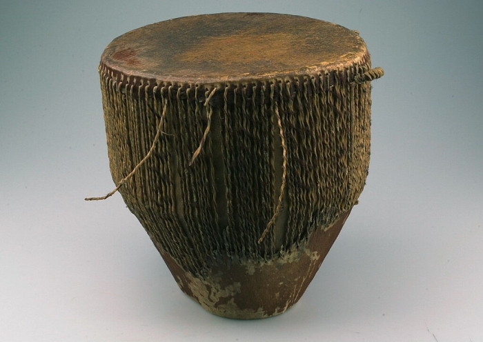 Deze conische drum, ook wel ntenga genoemd, is dubbelvellig, maar er wordt alleen op het bovenste vel geslageb.